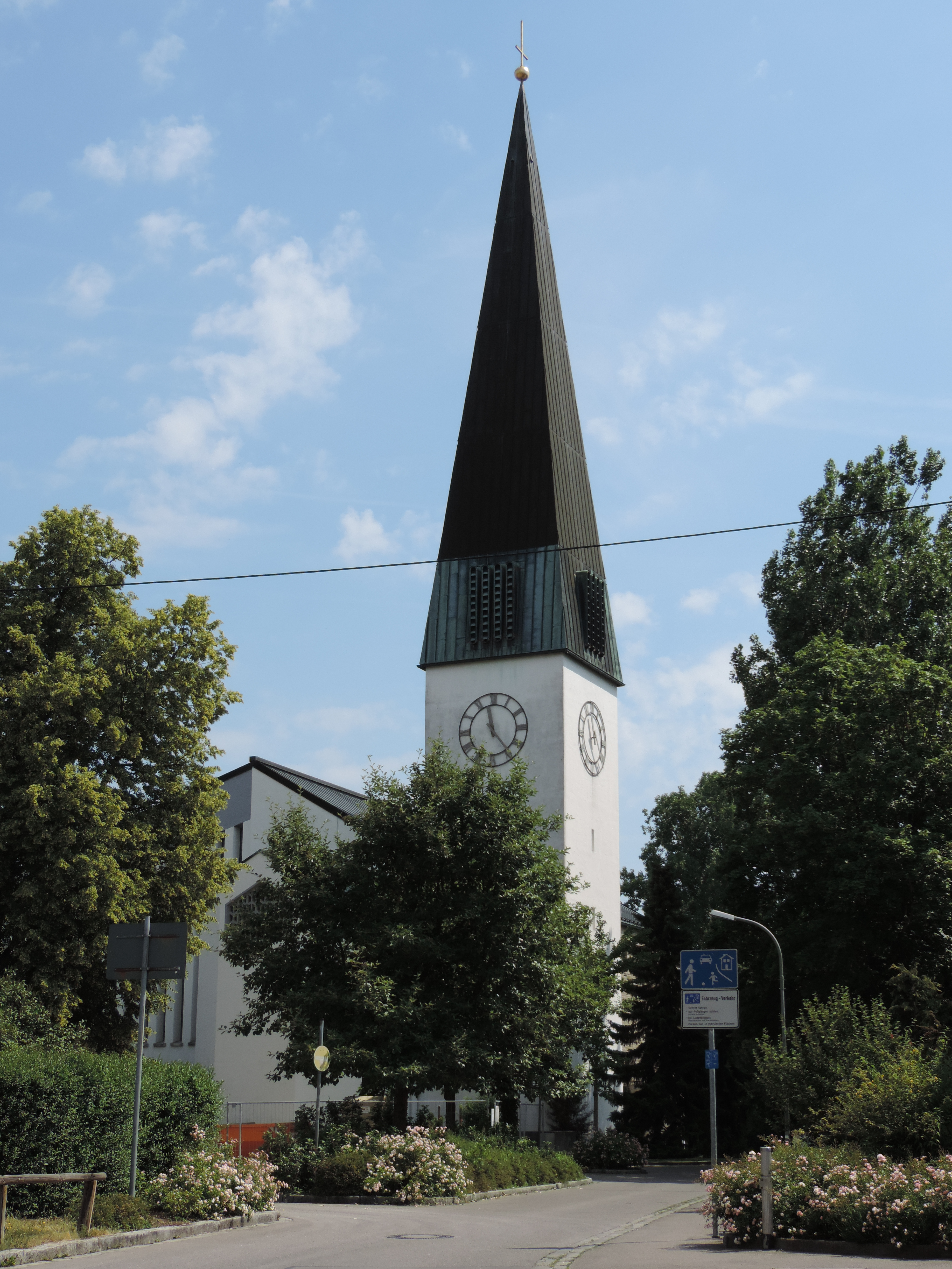 Pfarrkirche Christkönig, Augsburg Hammerschmiede, Straßenansicht